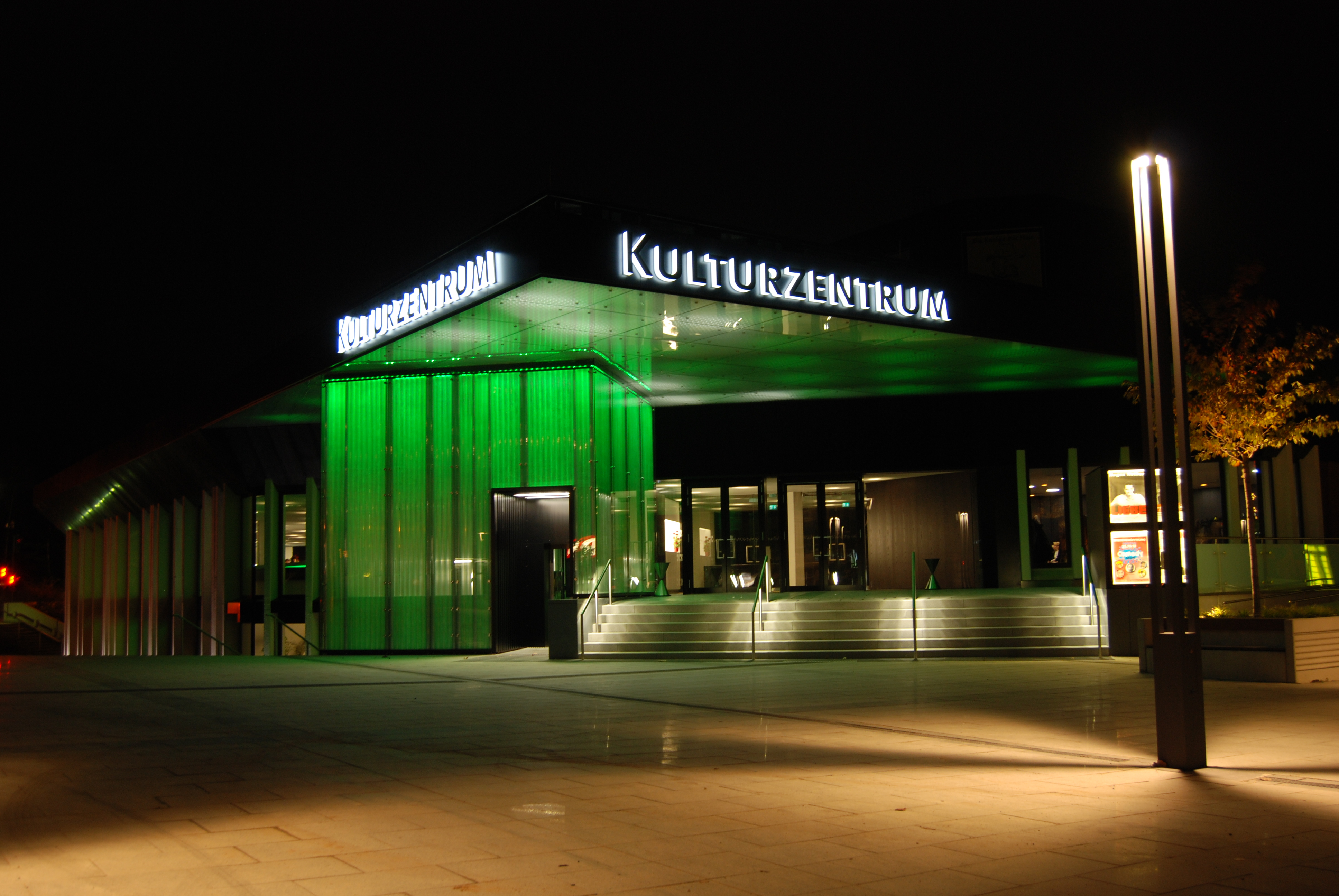 Kulturzentrum Hernen nach dem Umbau 2010